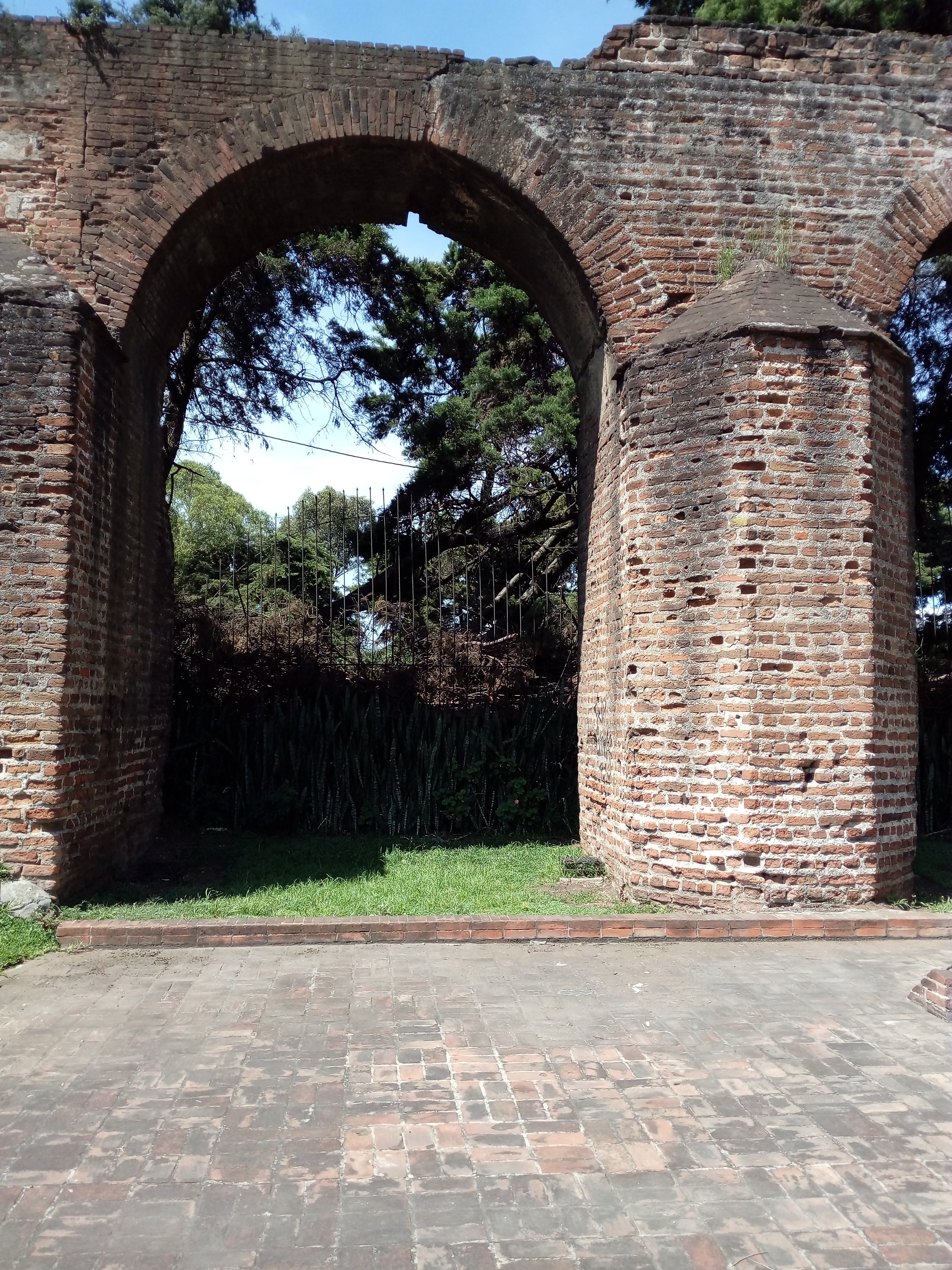 Arco del acueducto de Pinula